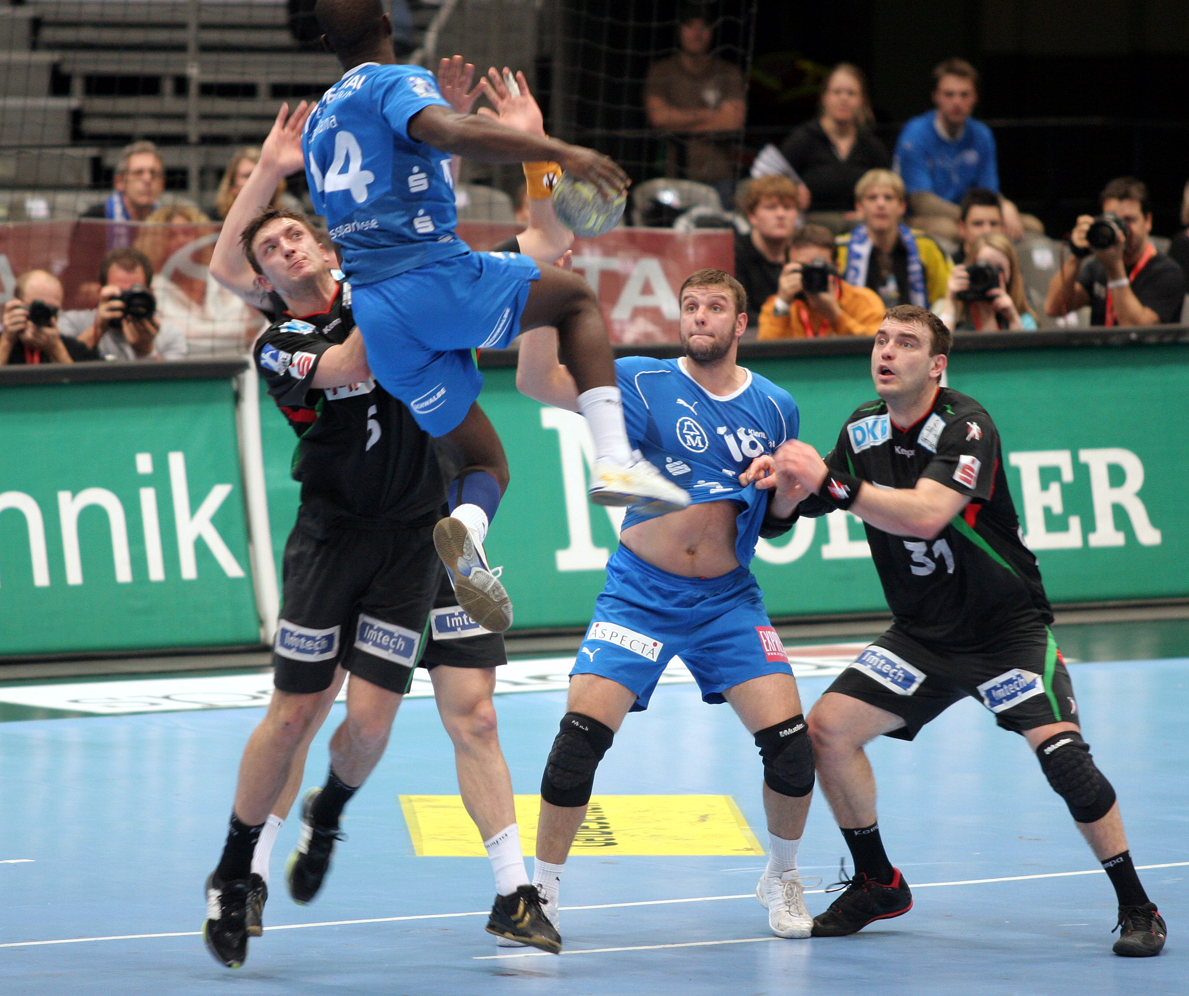 Eine Szene aus einem Bundesligaspiel (VfL Gummersbach - SC Magdeburg) am 19. November 2008 in der Kölner Lanxess-Arena